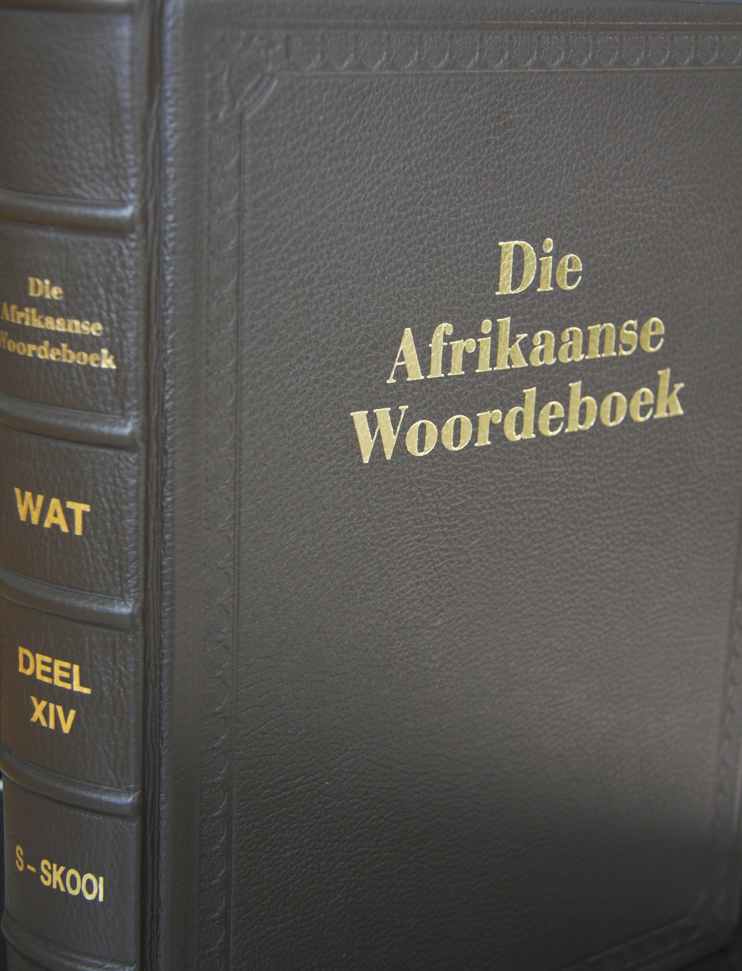 Deel XIV van die WAT